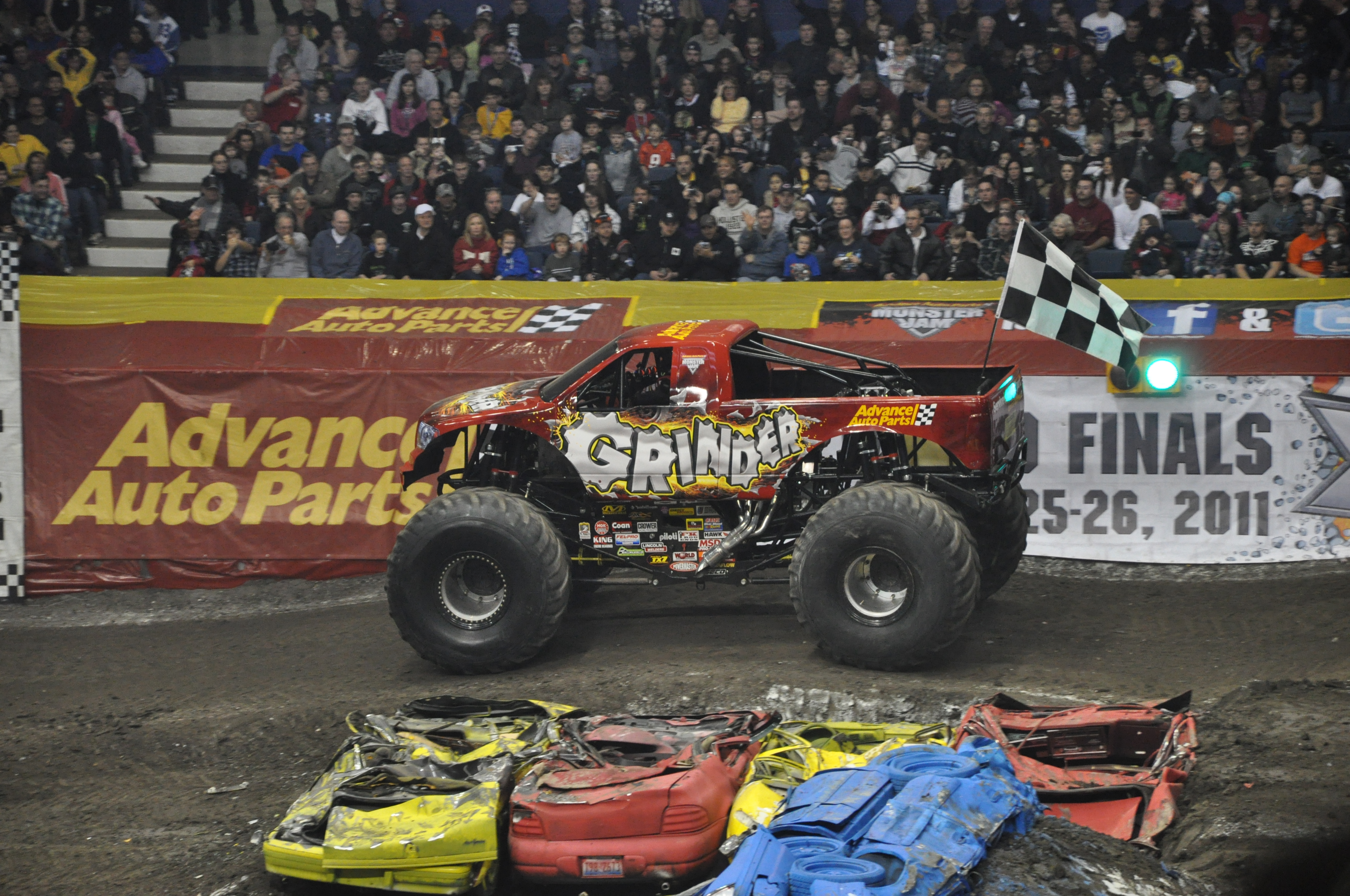 Monster Jam at Allstate Arena 2011